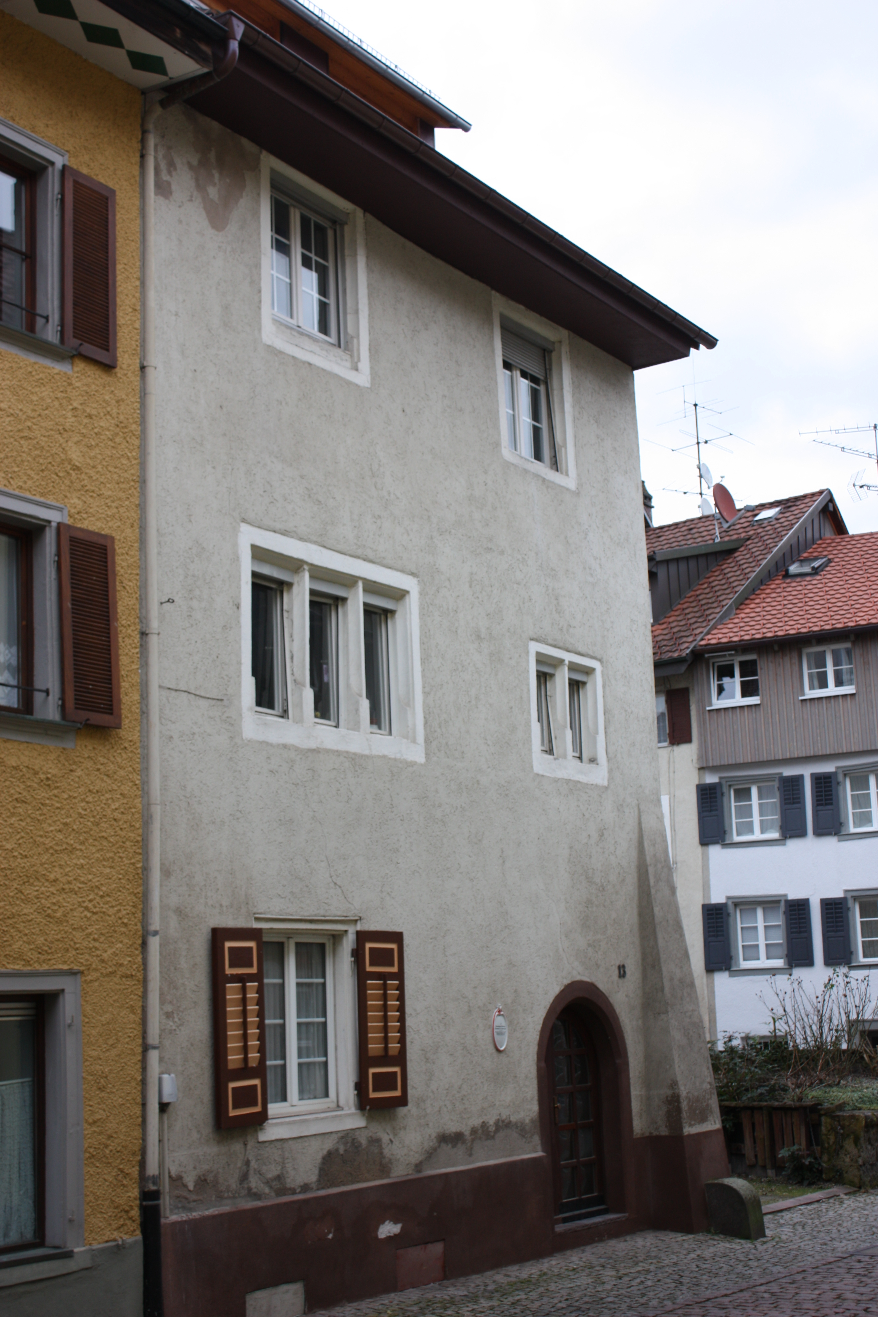 Priestergasse in Tiengen Kreis Waldshut. Haus der hebräischen Uffizin.